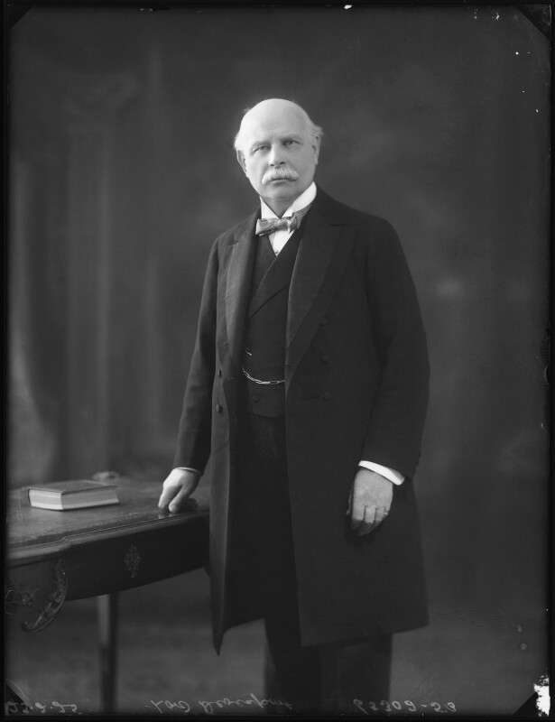 Lord Devonport